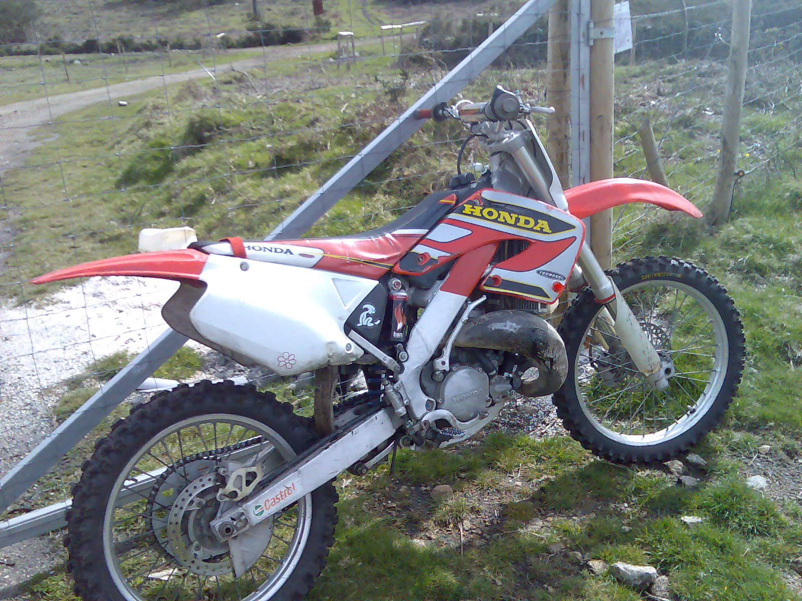 Campionato do mundo de motocross en Estoril.